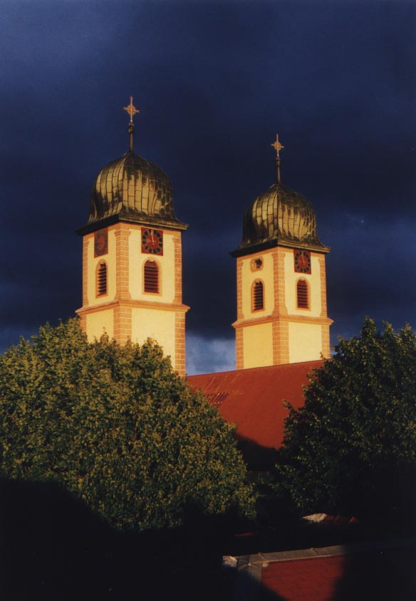 Klosterkirche St.Märgen